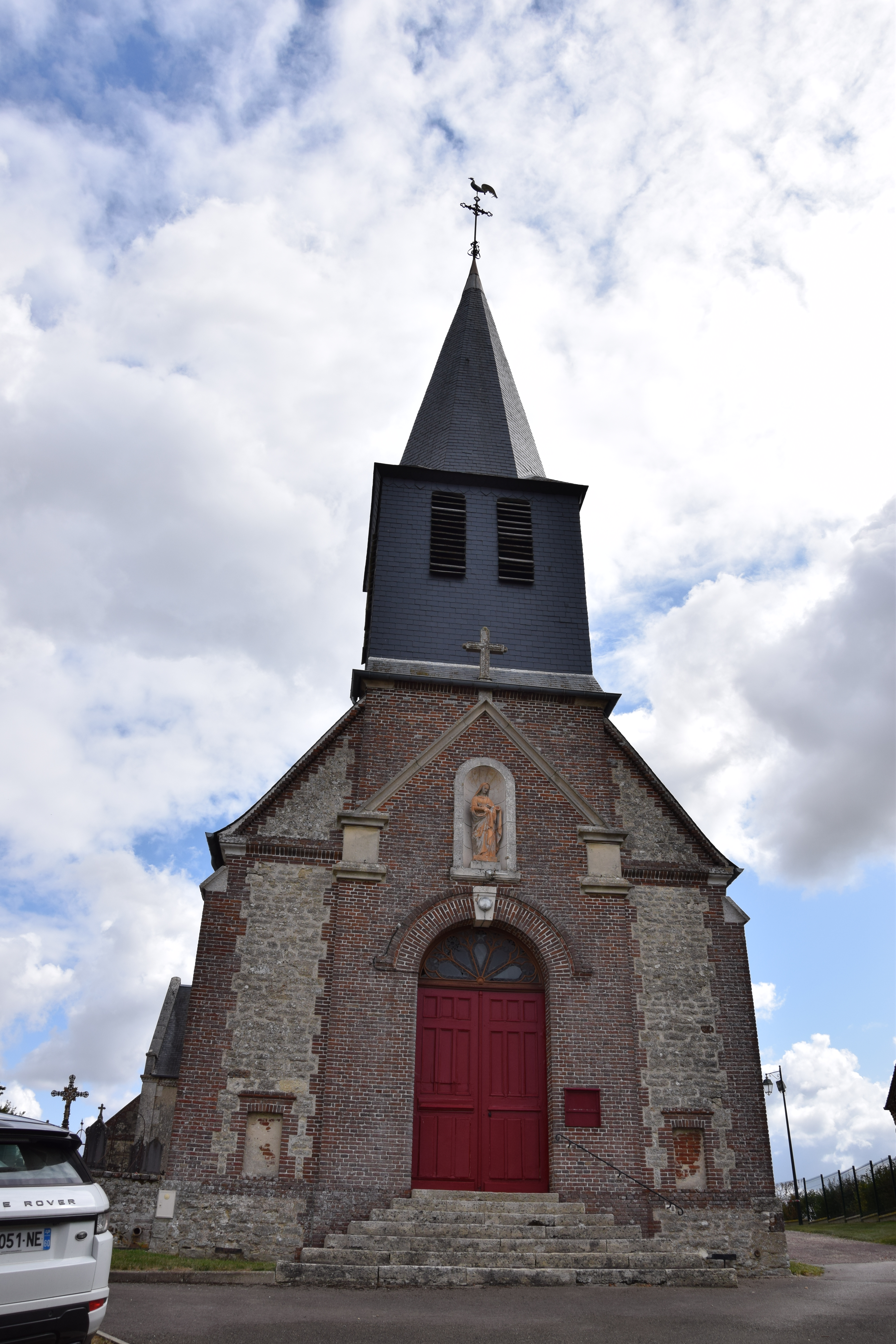 église Villembray